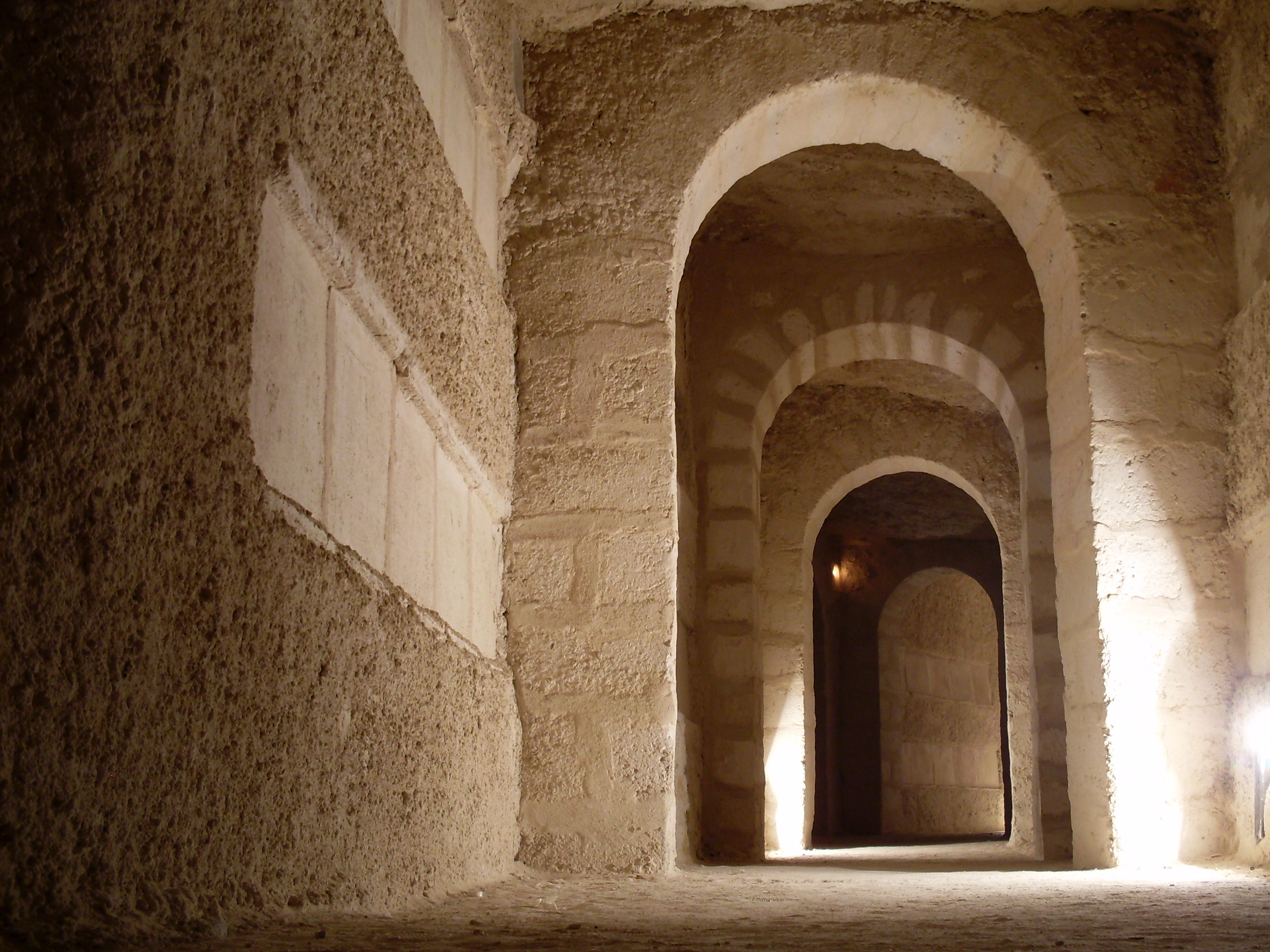 Catacombes de Sousse